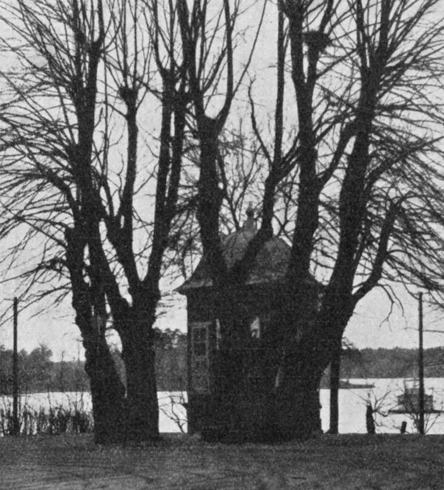 Drottning Kristinas lövsal (på Stallmästaregården) med sina fyra lindar ännu i behåll